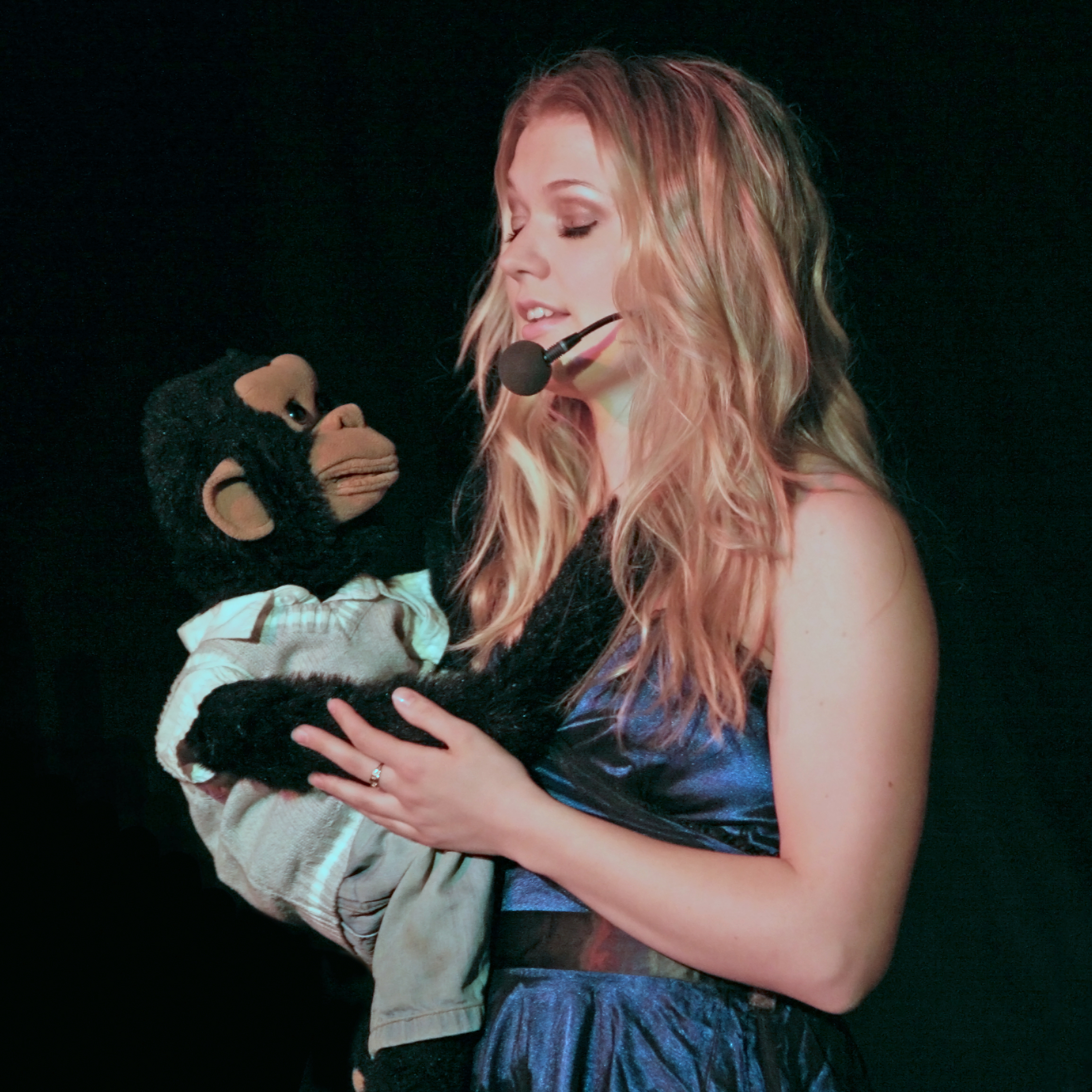 Zillah & Totte framträder i Vaxholm 2009.